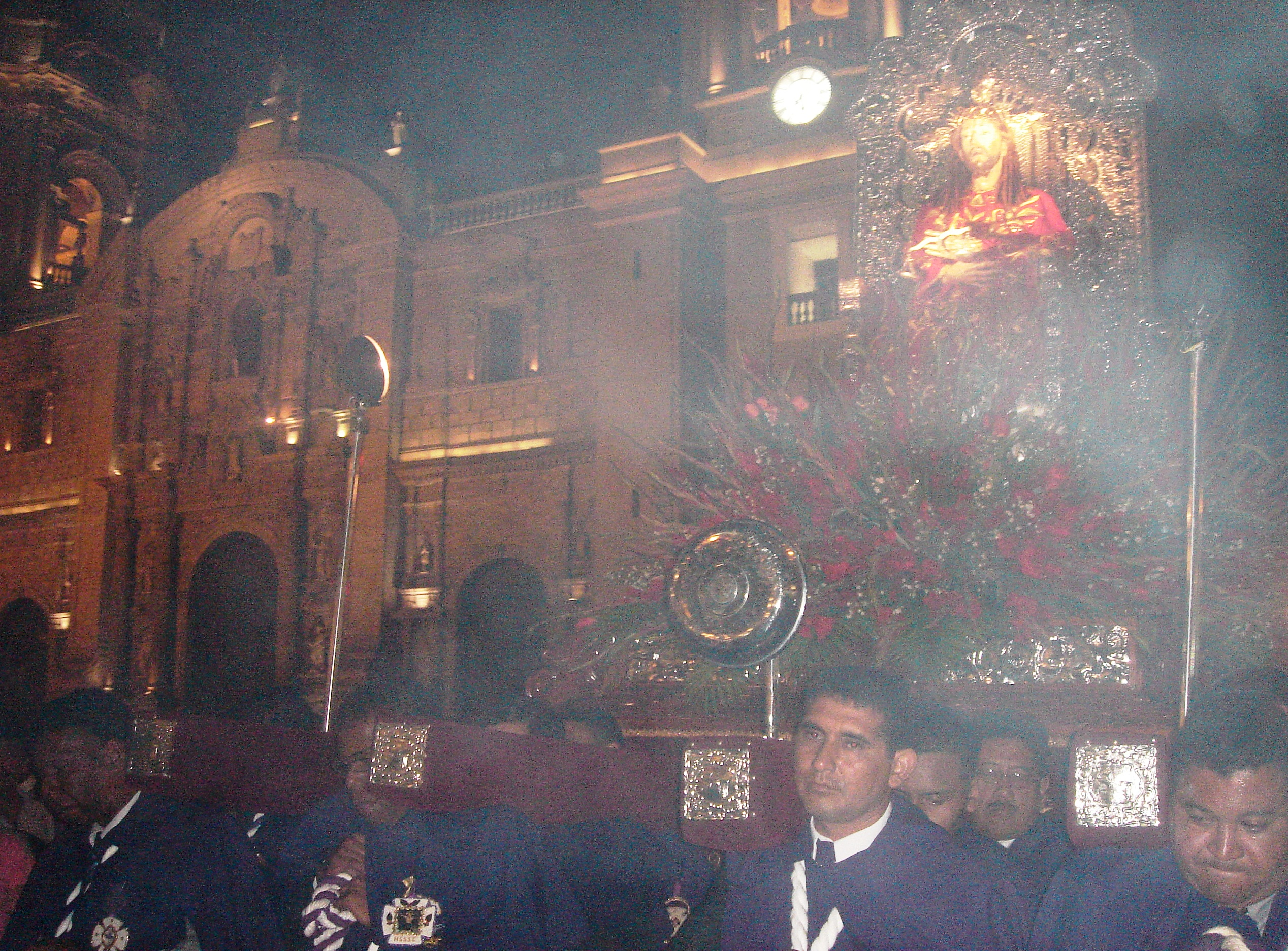 Procesión del Señor de la Justicia de la Basílica del Rosario de Lima, Martes Santo 2010.